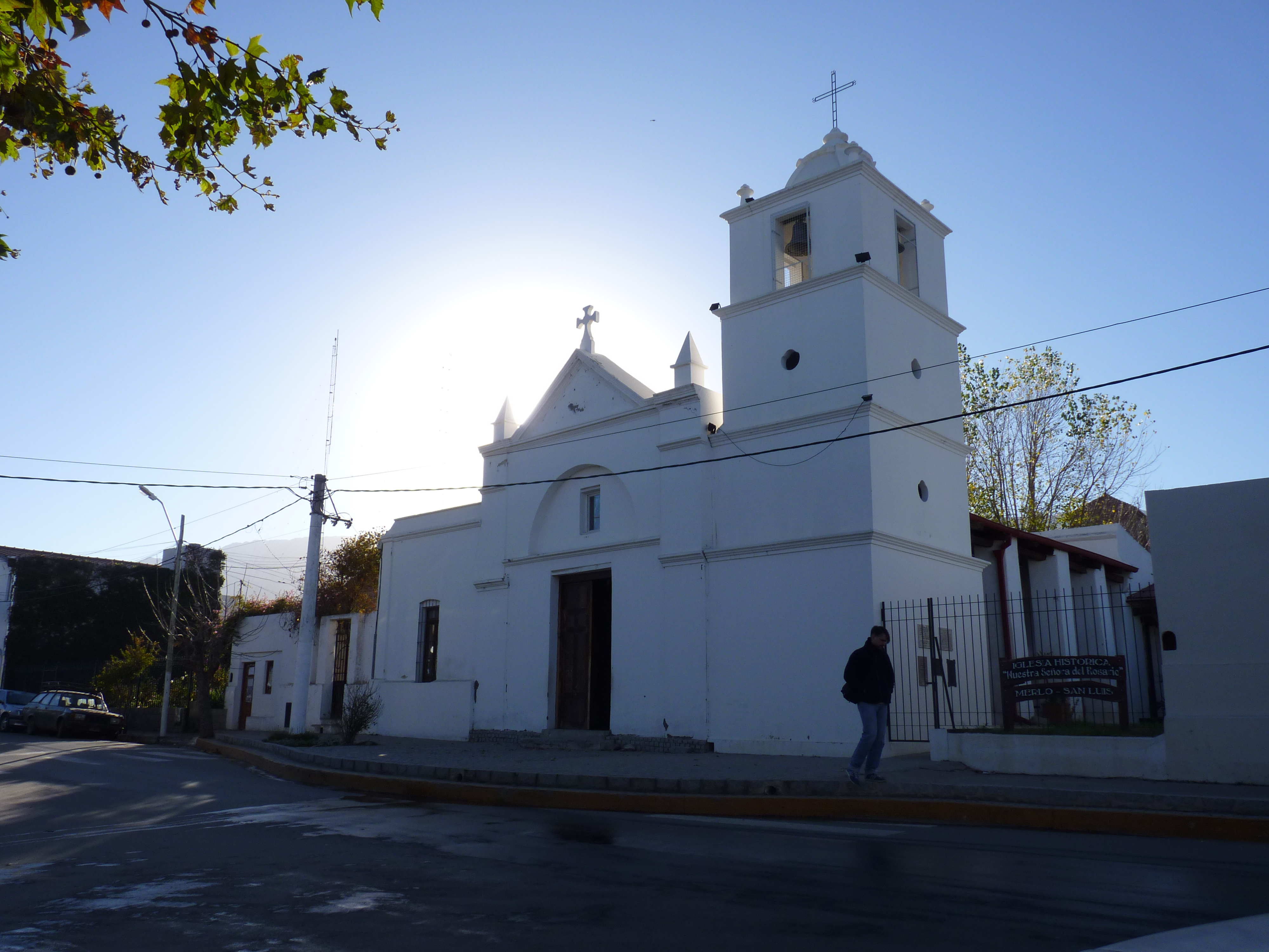 Capilla del Rosario de Piedra Blanca (o del Rosario de la Villa de Merlo)